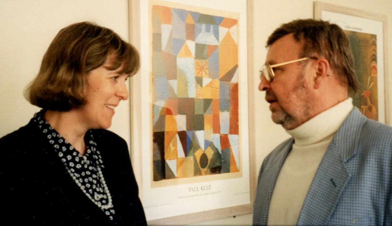 Petra Ertel, langjährige Personalchefin des Norddeutschen Rundfunks, mit Hans-Jürgen Hermel, Personalratsvorsitzender NDR Hannover